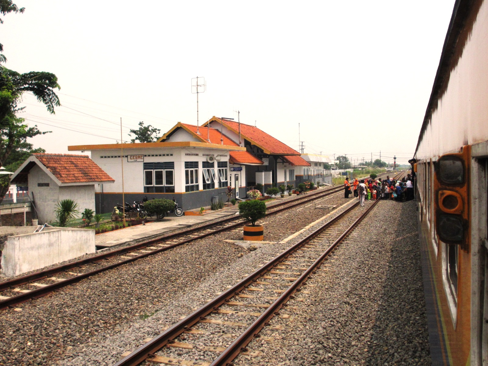 Stasiun Cerme, 2015.